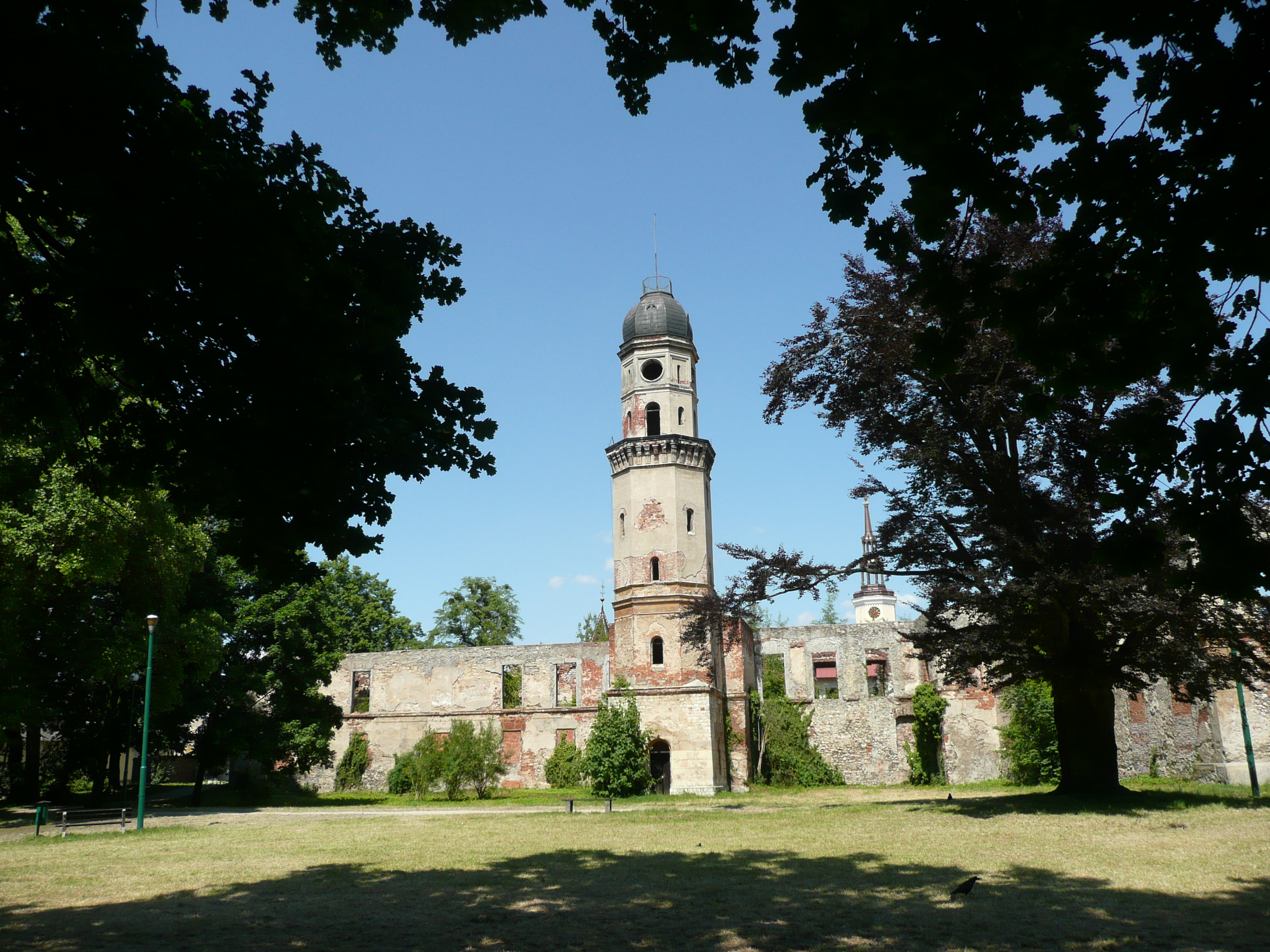 Zamek w Strzelcach Opolskich